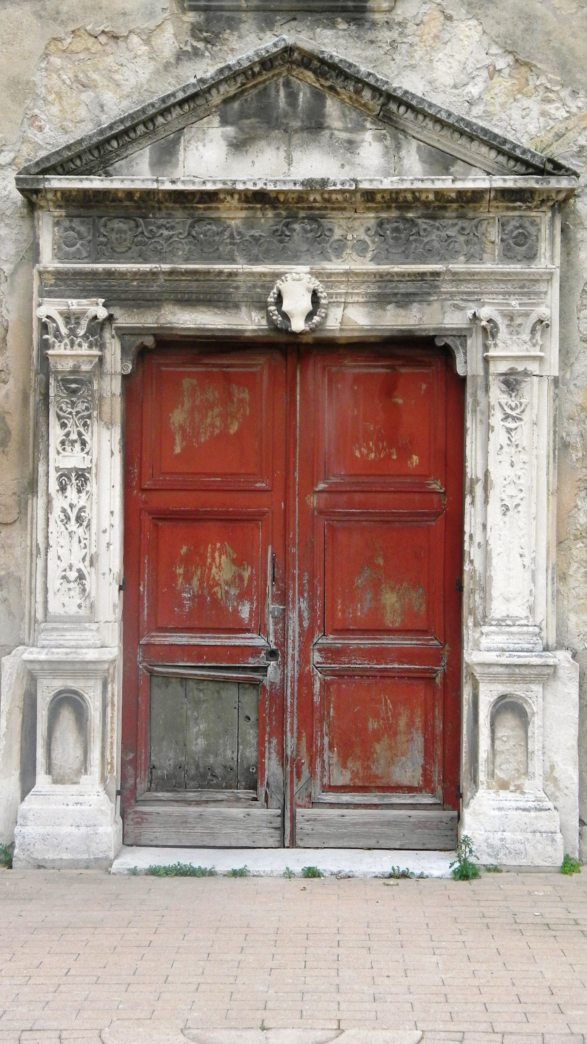 Portail Renaissance de la chapelle Notre-Dame de la Consolation à Aix-en-Provence